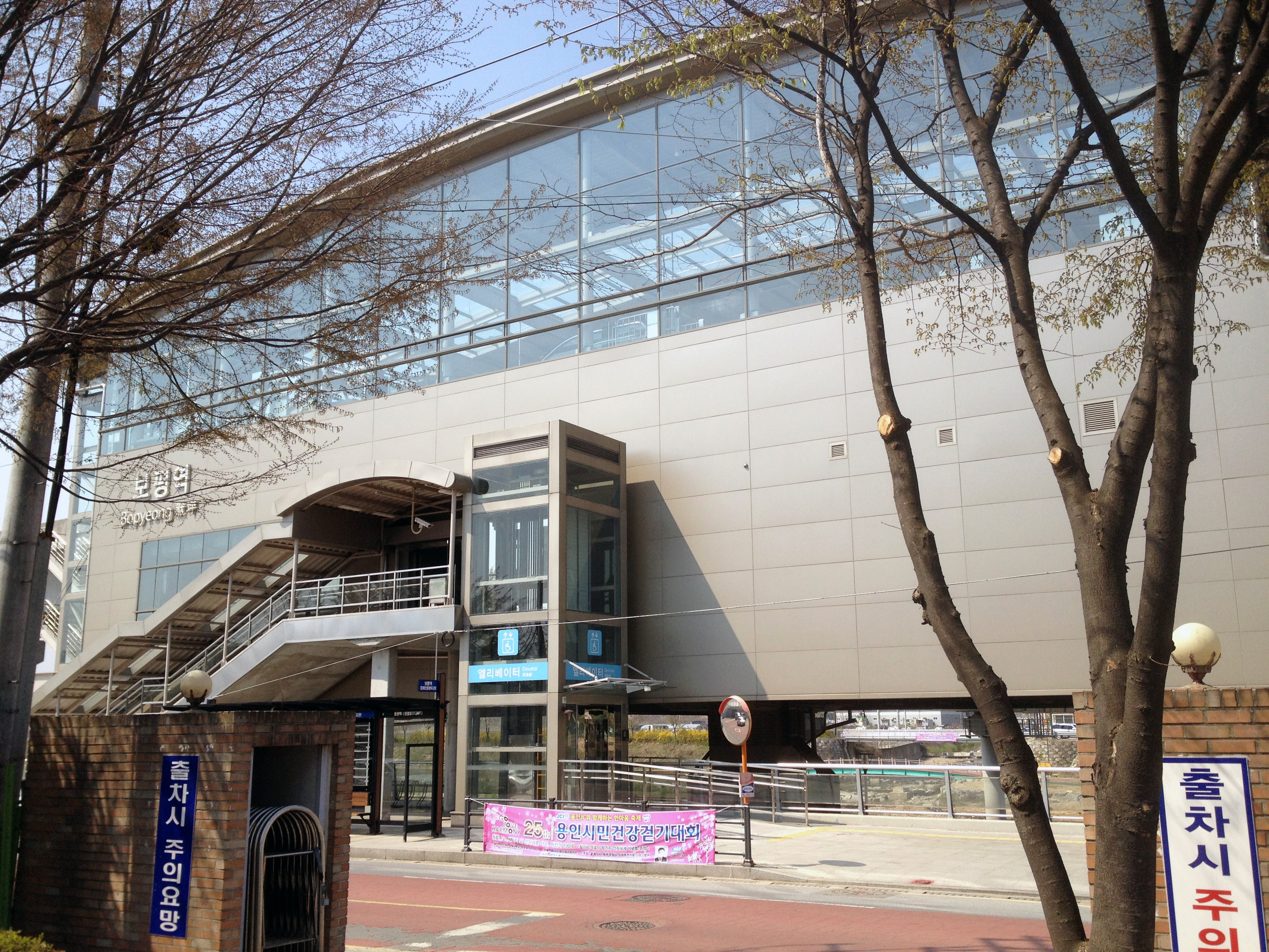 보평역 역사